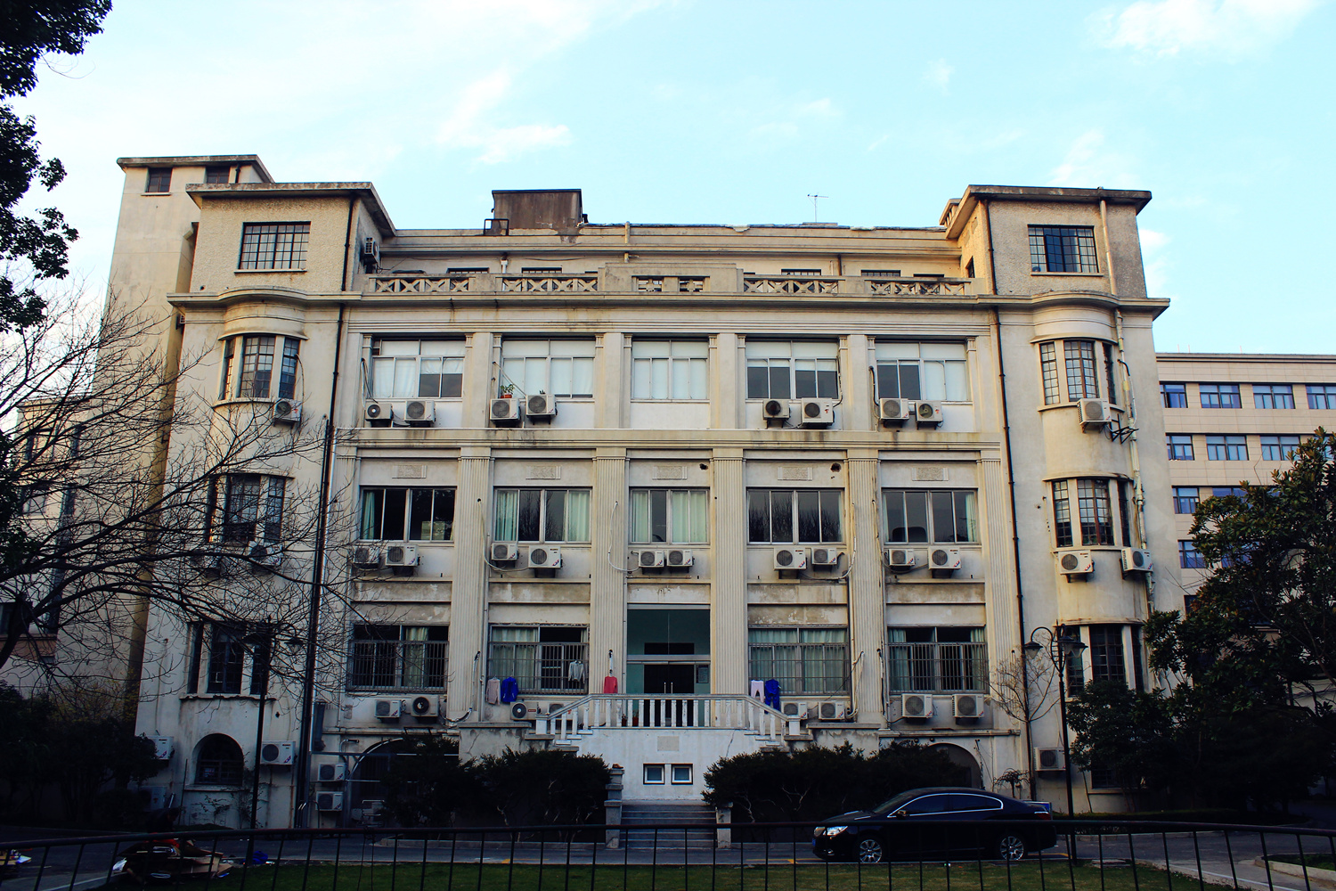 五官科医院内，原犹太医院正立面